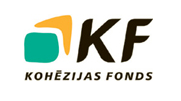 Kohēzijas fonda (KF)zīmols